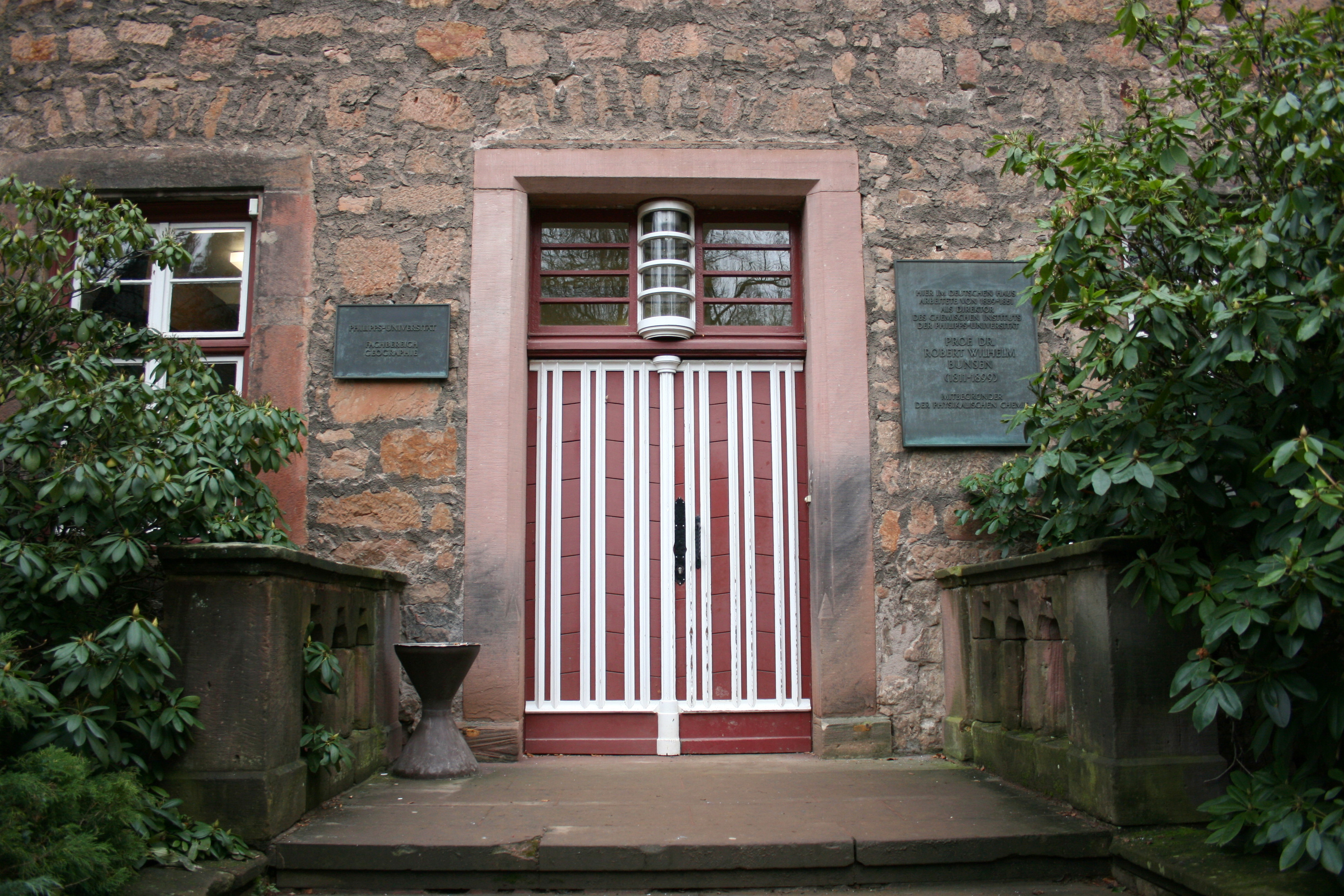 Tür des Deutschen Hauses der Uni in Marburg